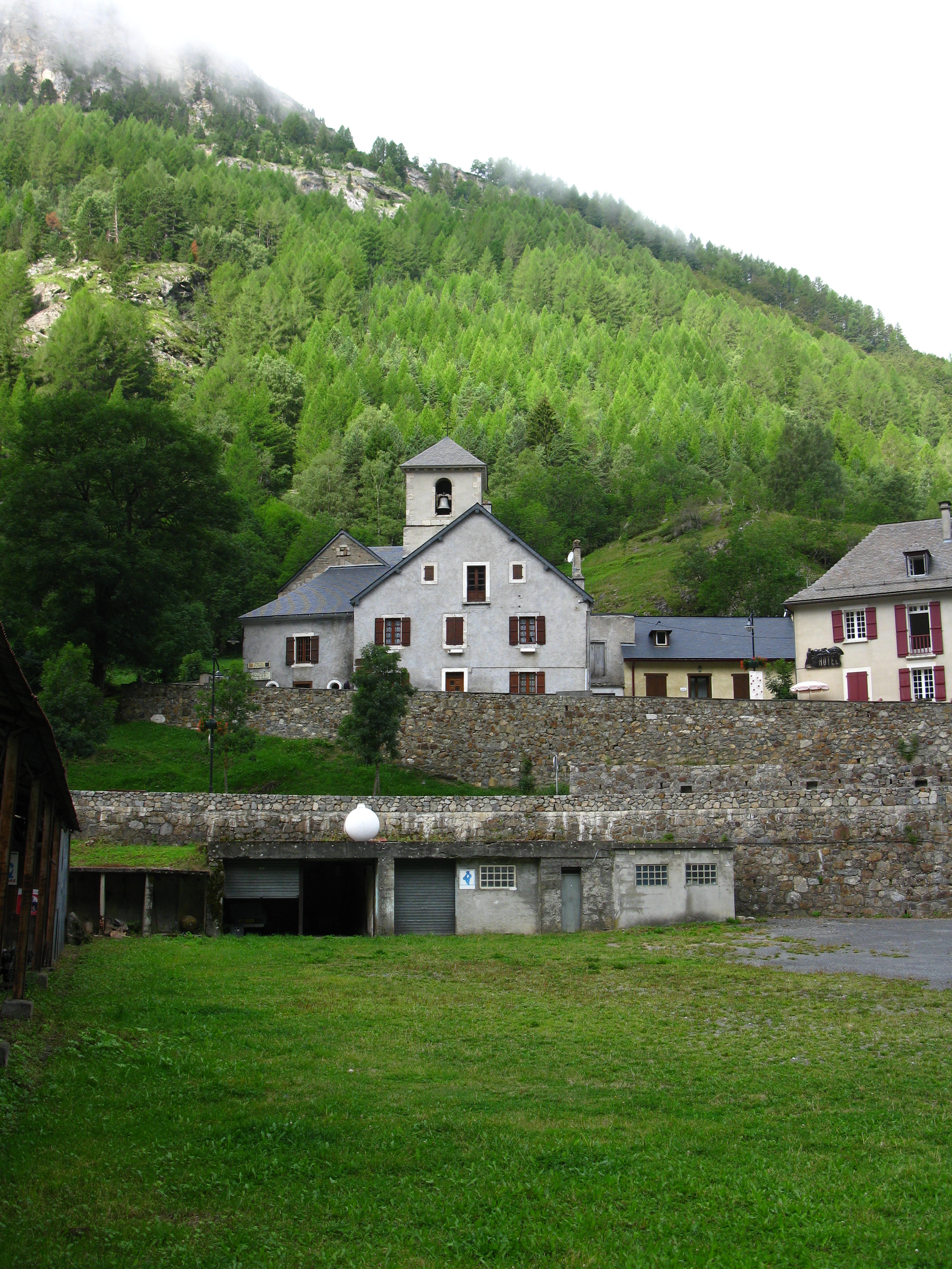 Église Notre-Dame du bon Port à Gavarnie (Hautes-Pyrénées) et les maisons alentours .